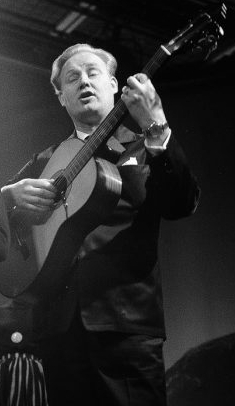 Suomalainen laulaja, säveltäjä, kapellimestari, sovittaja ja trumpetisti Eino Virtanen (1925-1999) vuonna 1965.